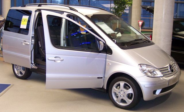 Mercedes Vaneo Wiki, silber